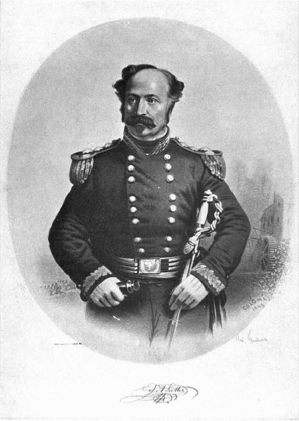 Johann August Sutter - 1854. Nach einer Lithografie